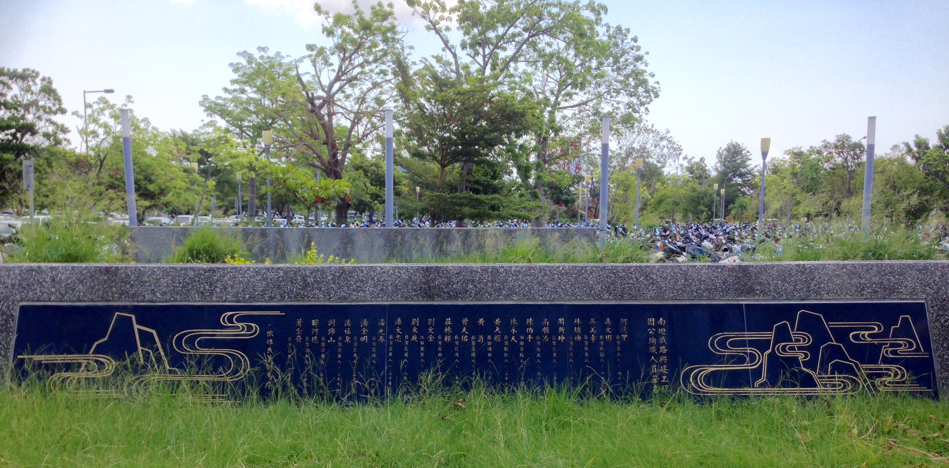 中文（台灣）: 南迴鐵路興建工程殉職人員紀念碑。